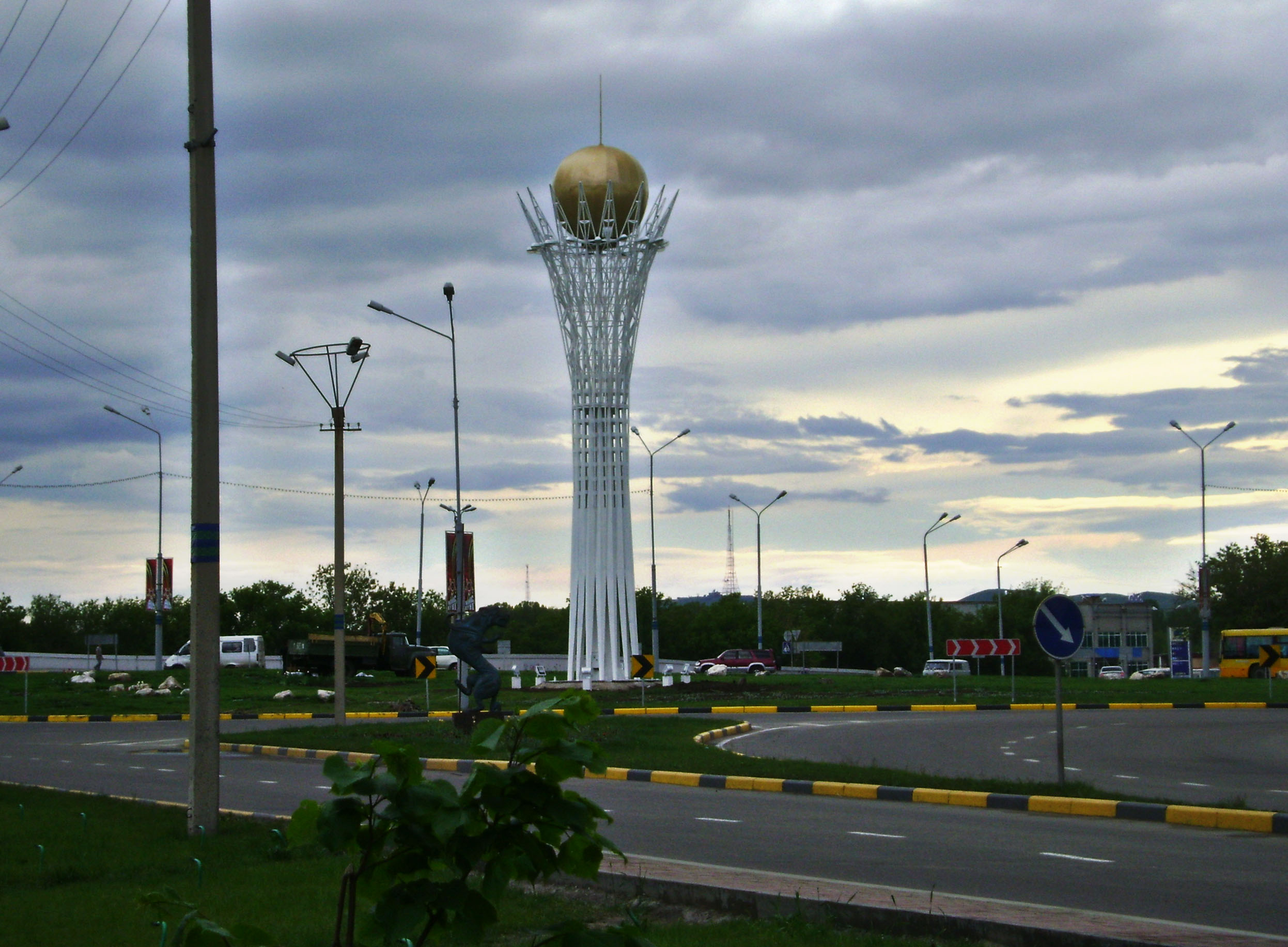 Усть-Каменогорский байтерек